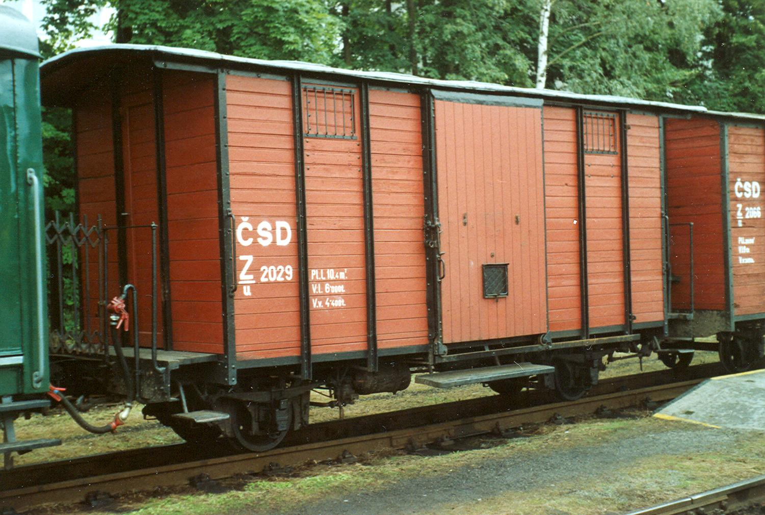 Güterwagen des Museumszuges (JHMD in Jindřichův Hradec).